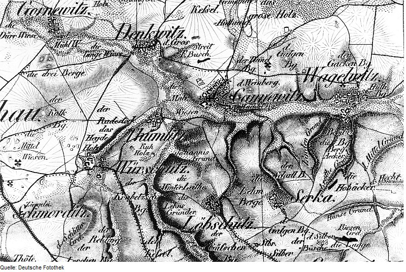 Original image description from the Deutsche Fotothek Nerchau-Cannewitz. Oberreit, Sect. Leipzig, 1836/39